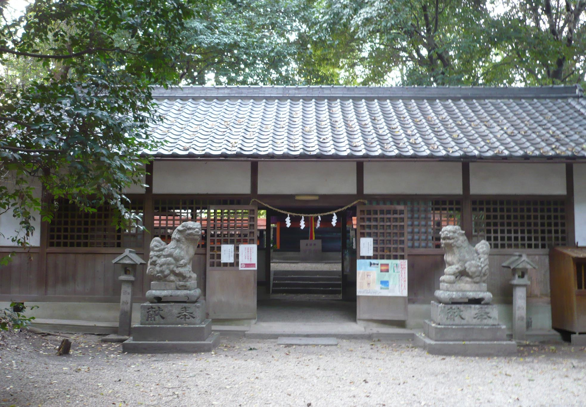 筒井城跡地に建つ菅田比売神社の拝殿